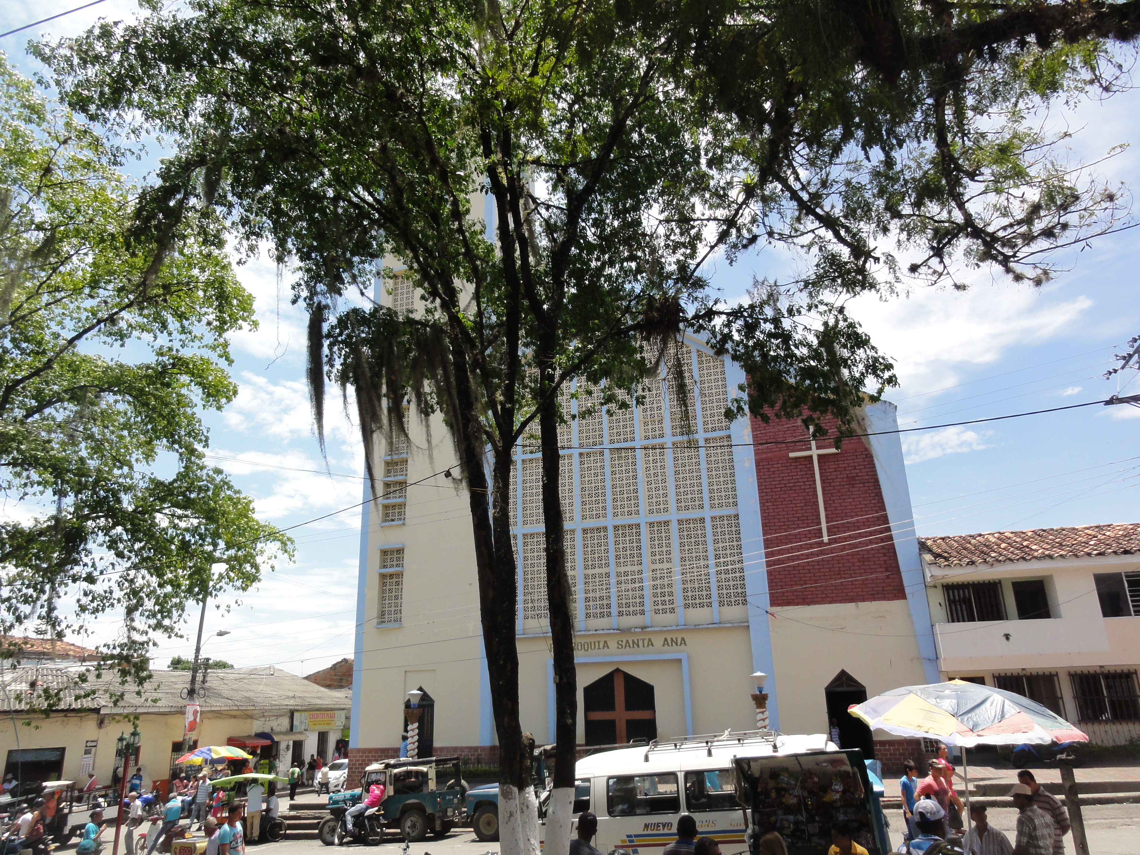 Parroquia Santa Ana. Ansermanuevo, Valle, Colombia.